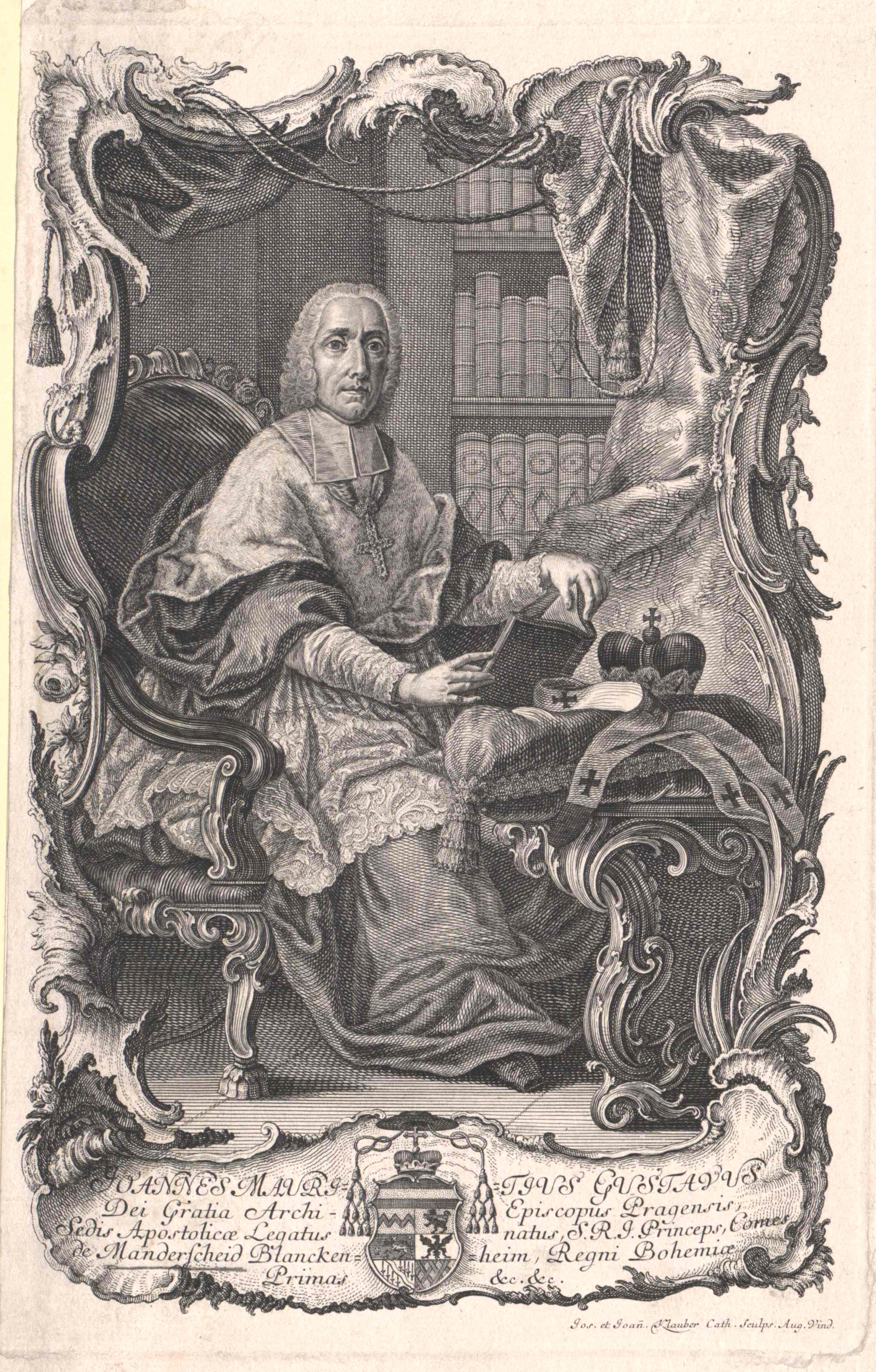 Johann Moritz Gustav Graf Manderscheidt-Blankenheim und Geroldstein (1676-1763) Wien, Österreichische Nationalbibliothek, Bildarchiv und Grafiksammlung, Porträtsammlung, Inventar-Nr. PORT_00080310_01